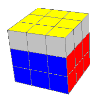 Rubik's Cube, hvor de to nederste lag er løst og det sidste orienteret korrekt.